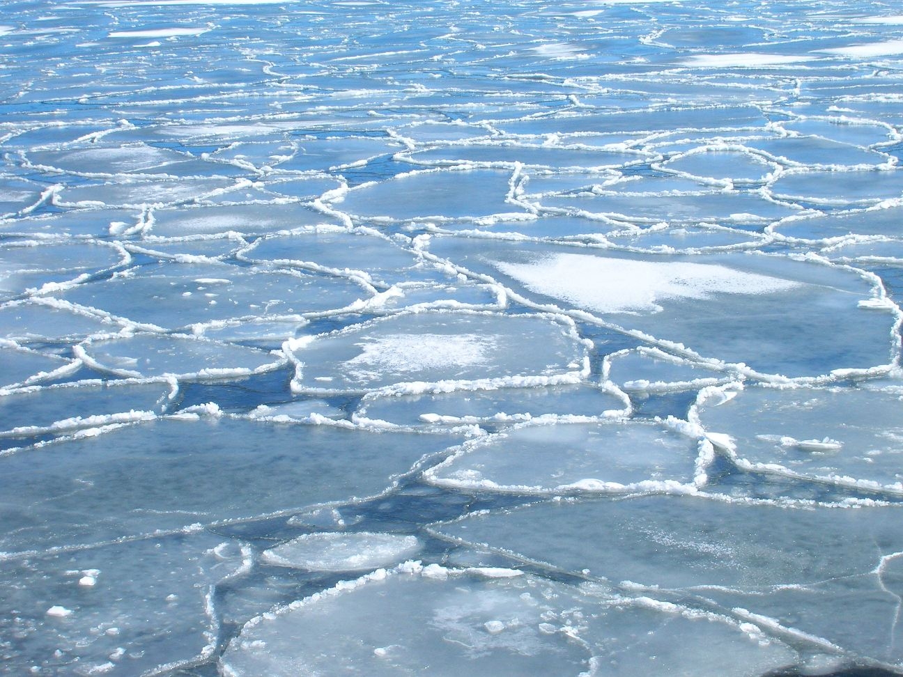 Melting ice in Nynäshamn - spring in Sweden